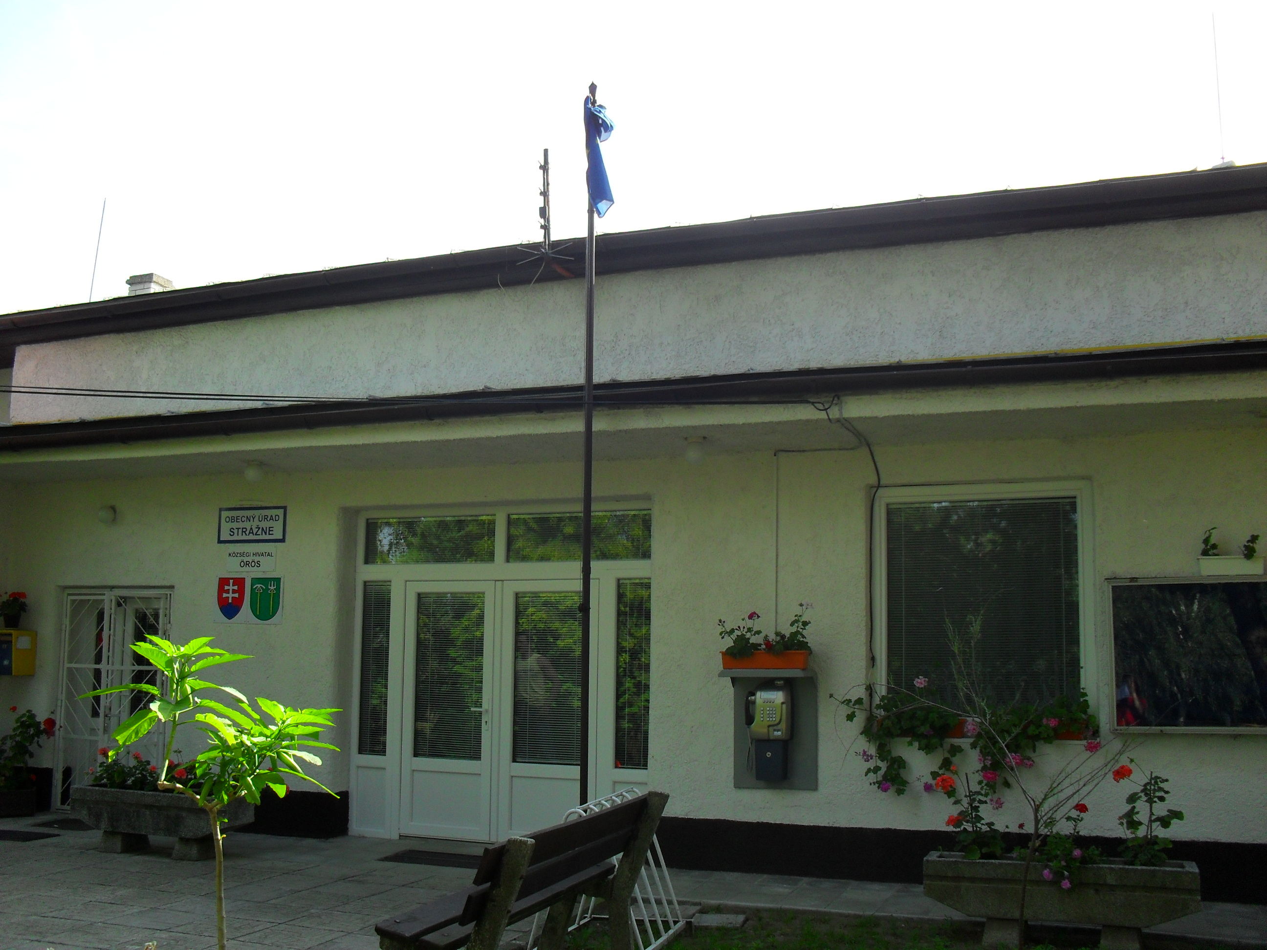 Őrös - községi hivatal